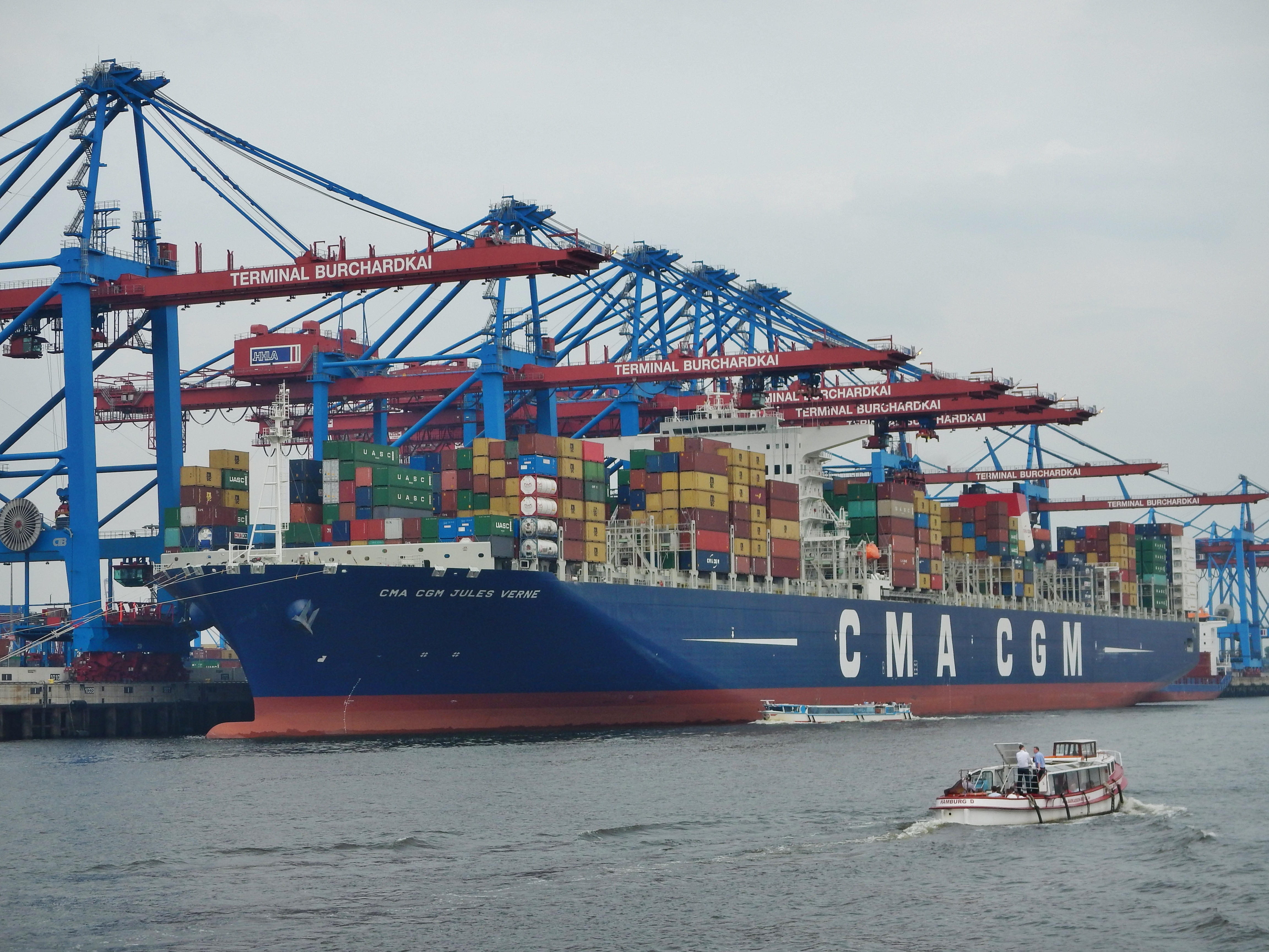 Containerhafen Hamburg